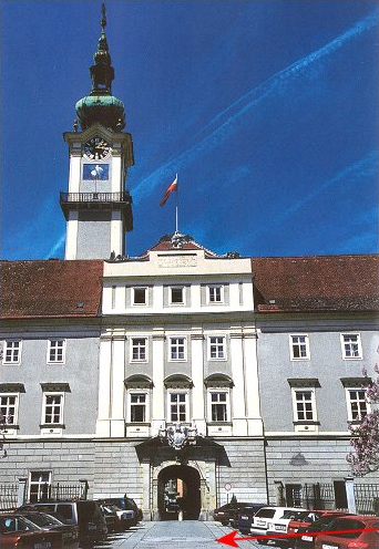 Linzer Landhaus mit Glockenring